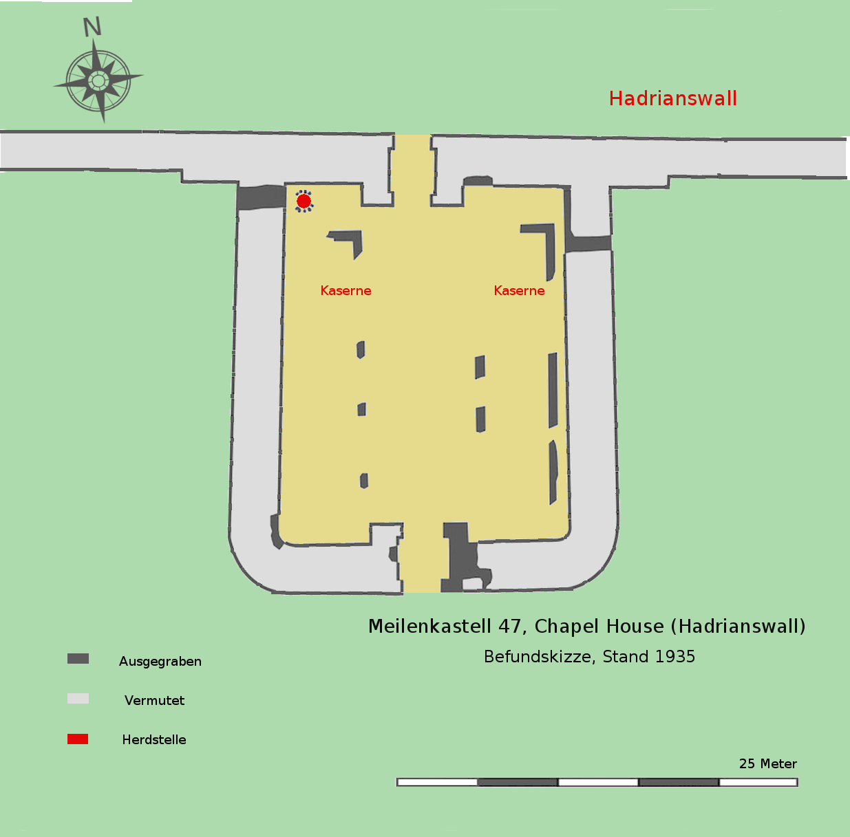 Befundskizze des Meilenkastell 47 (Chapel House) am Hadrianswall (GB), Stand 1935.